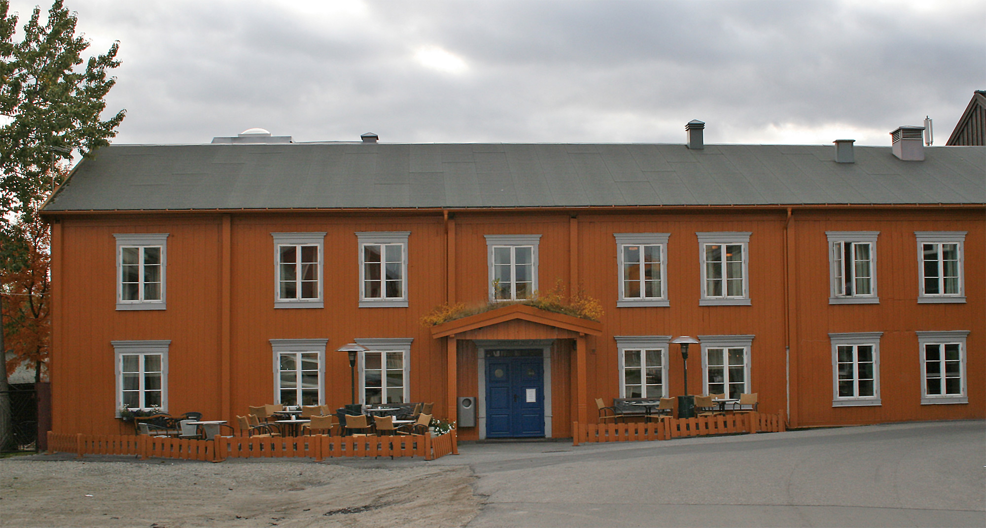 Bergmannsgata 1, Røros: Bygningen er avmerket på et av de eldste Røroskartene fra mellom 1711-1718. Utgjør nå en del av Bergstadens Hotell. : Directeurens Huus, hus no. 1